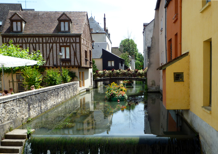 Le Puiseaux à Montargis, France